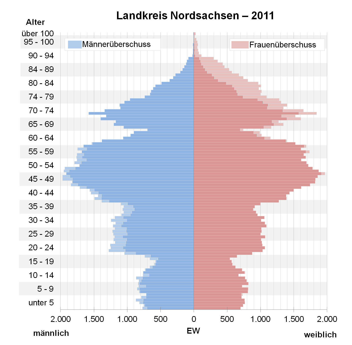 Bevölkerungspyramide des Landkreises Nordsachsen nach Zensus 2011.